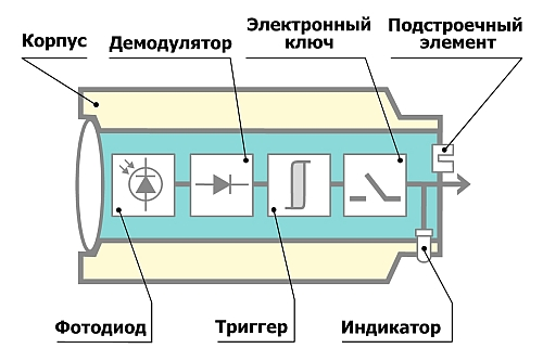 схематическое строение приёмника оптического датчика